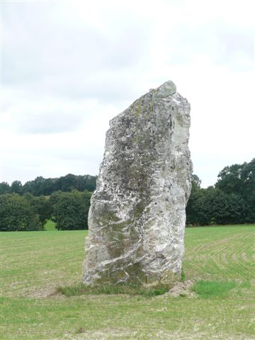 Menhir de la Haute-Pierre, Champeaux (France)